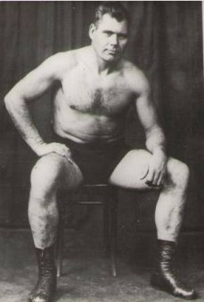 Боров Михаил Романович